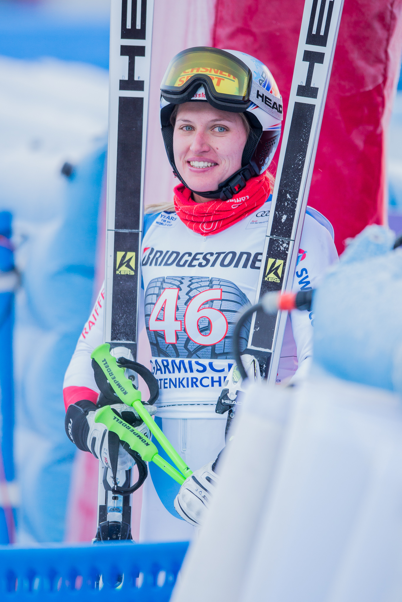 64. Kandahar Rennen,Audi FIS Ski Weltcup Garmisch-Partenkirchen,Damen Abfahrt,Denise Feierabend,Kandahar,Ladies Downhill